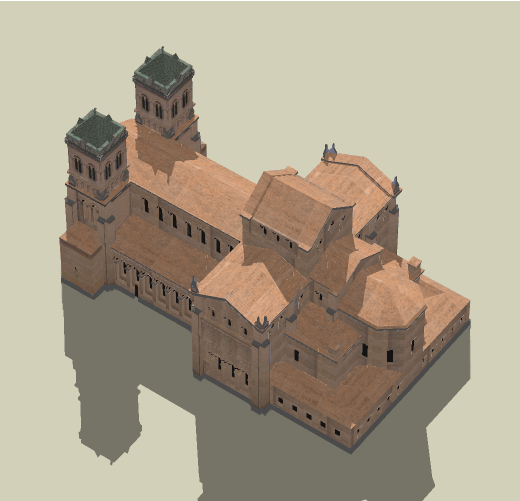 Imagen de modelo en 3D - Goggle Sketchup - de la Catedral Basilica Metropolitana de Medellin